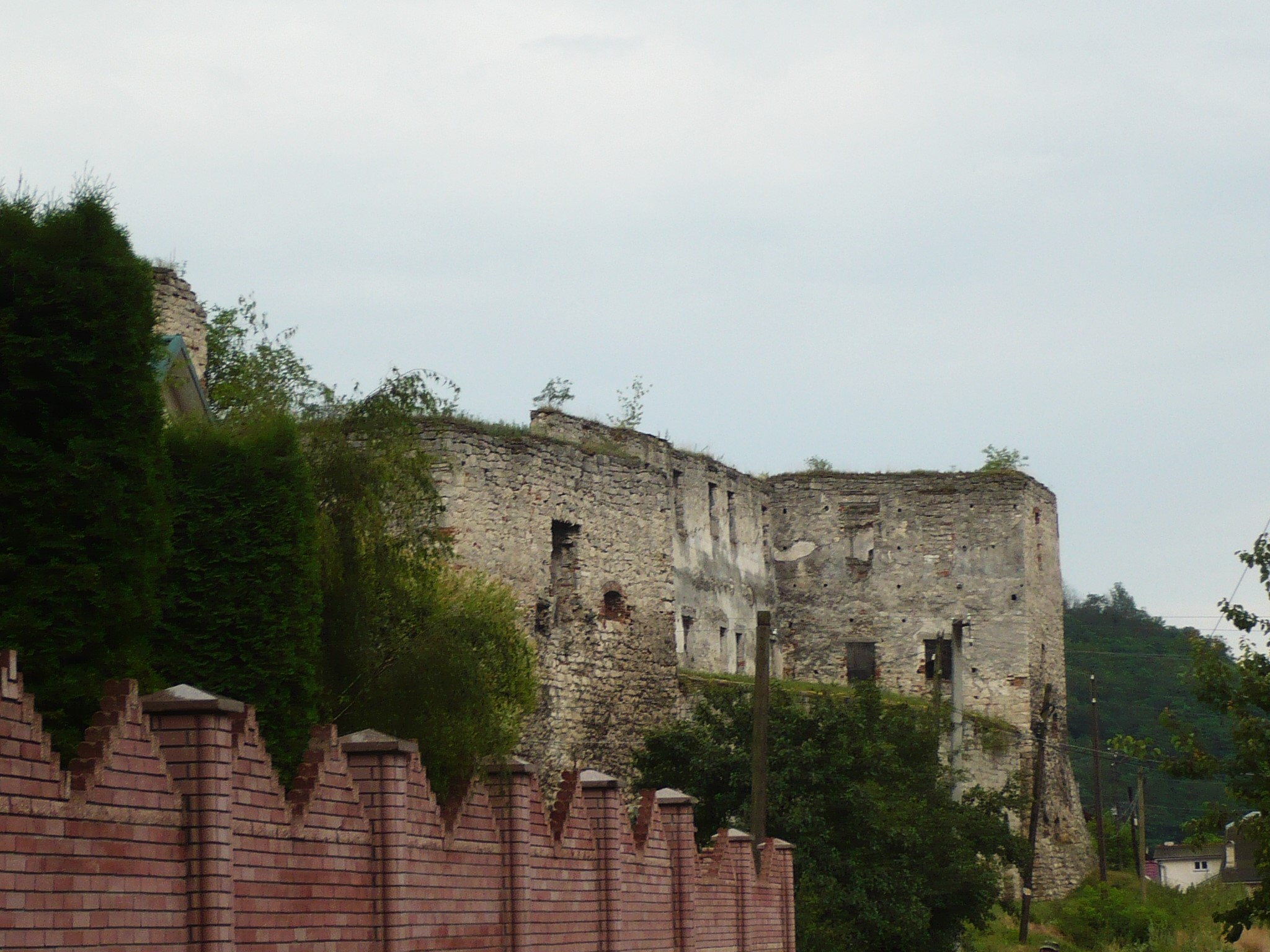 Czortków. Zamek